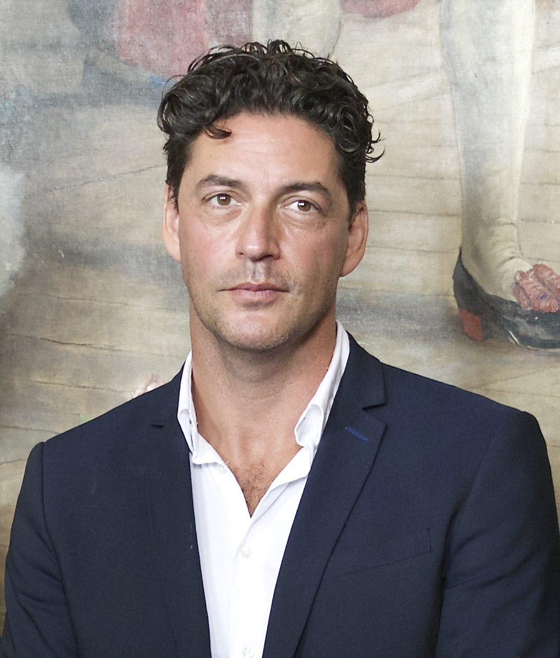 Reuben Sallmander under Dramatens höstsamling 2014.